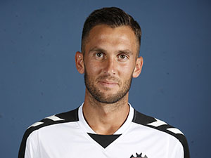 Carlos Delgado